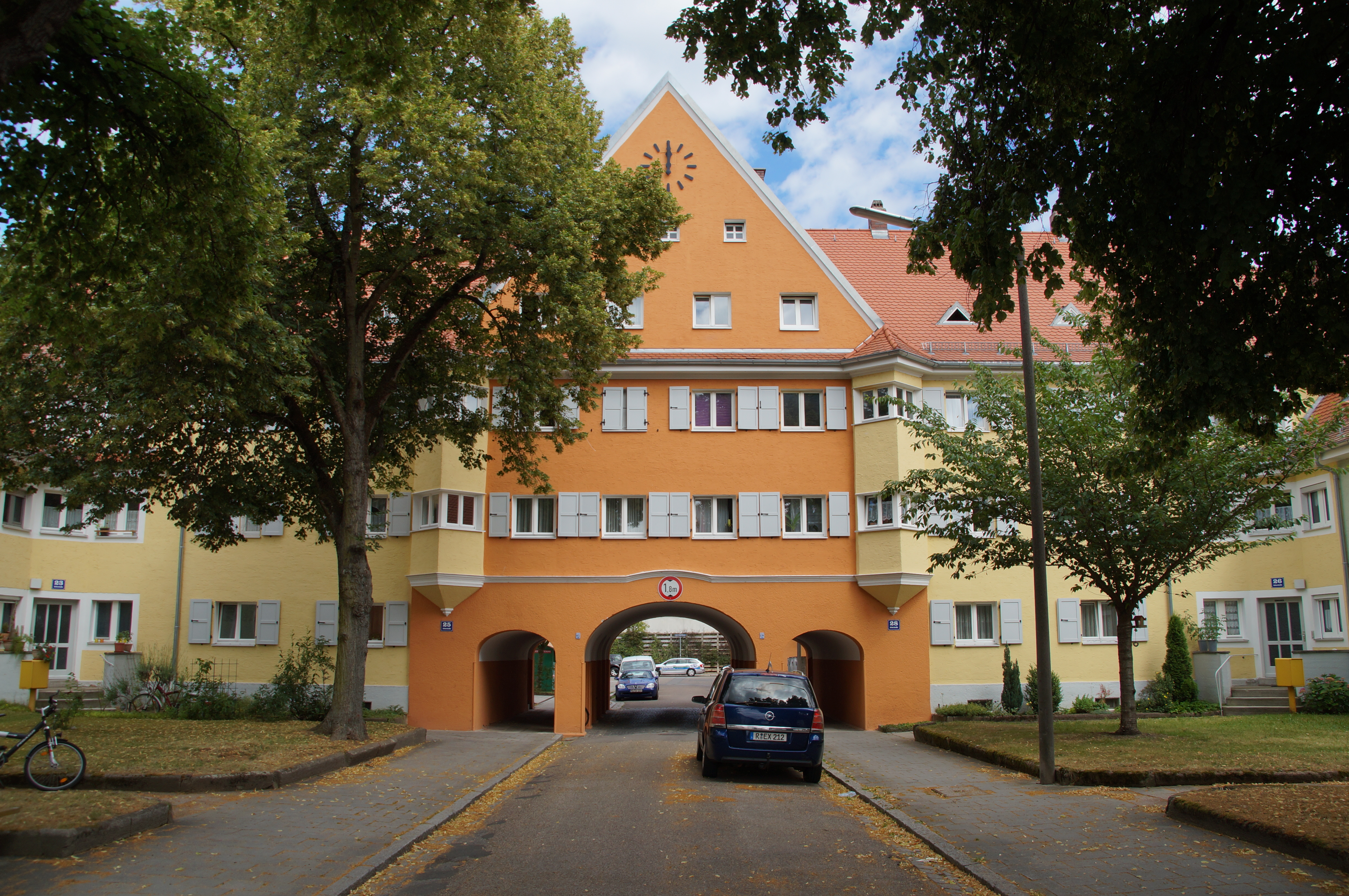 Ensemble Wohnsiedlung Arberstraße, Reinhausen, Regensburg, Arbeitersiedlung aus der Zeit nach dem Ersten Weltkrieg, Torgebäude in der Arberstraße